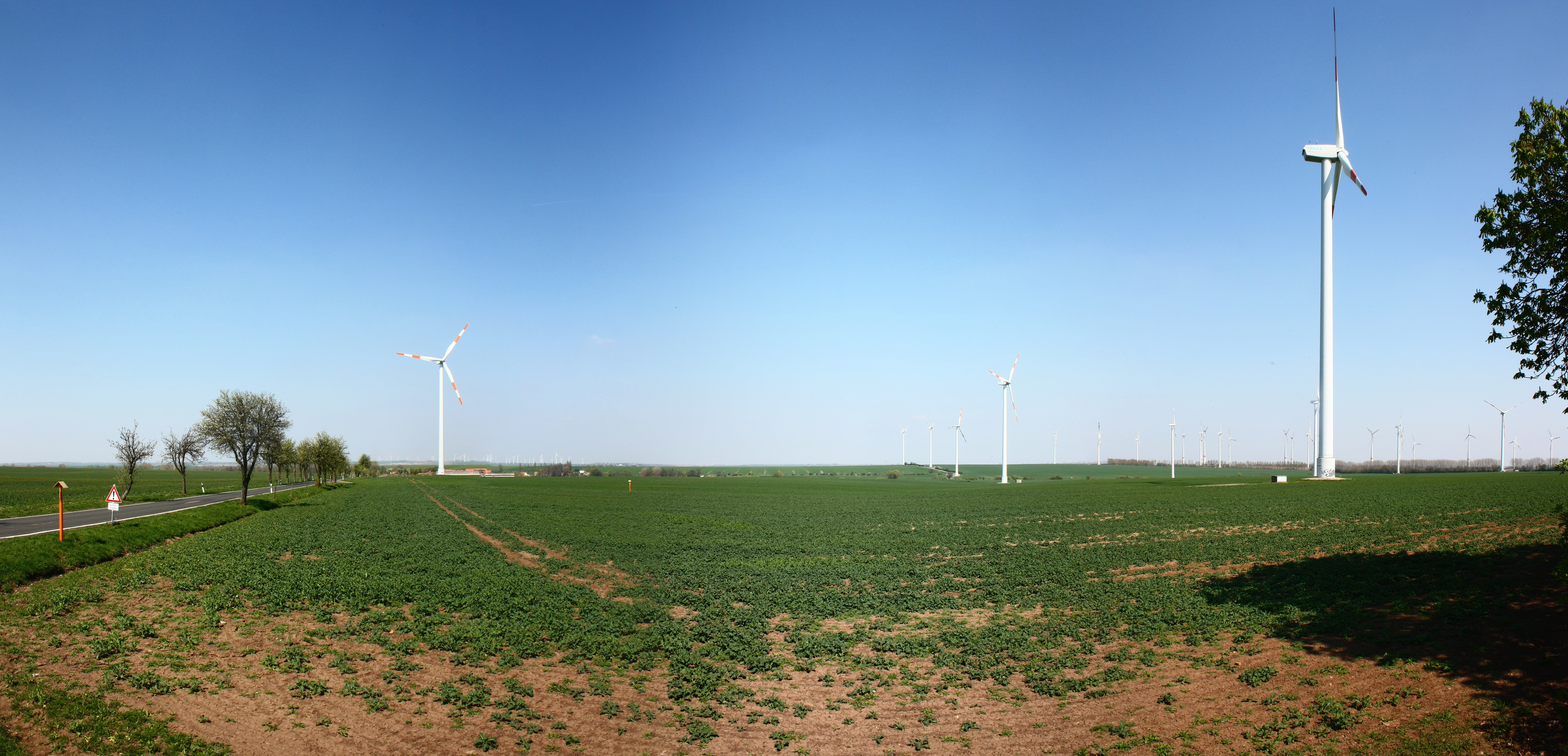 Blick von der Landstraße Halle-Mansfeld auf das Dorf Rottelsdorf und den Windpark östlich davon.